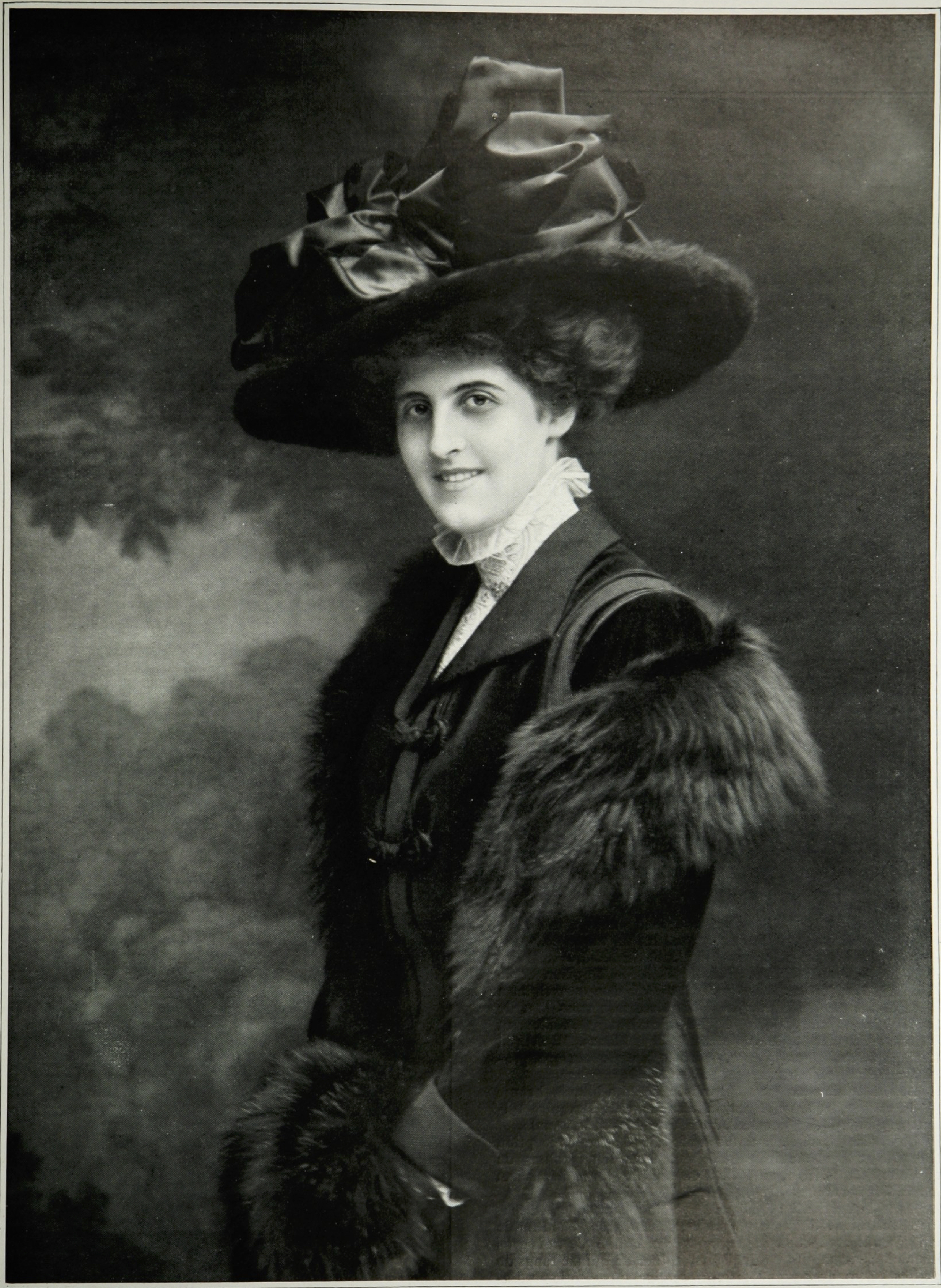 Noémie Halphen (1888-1968), baronne de Rothschild